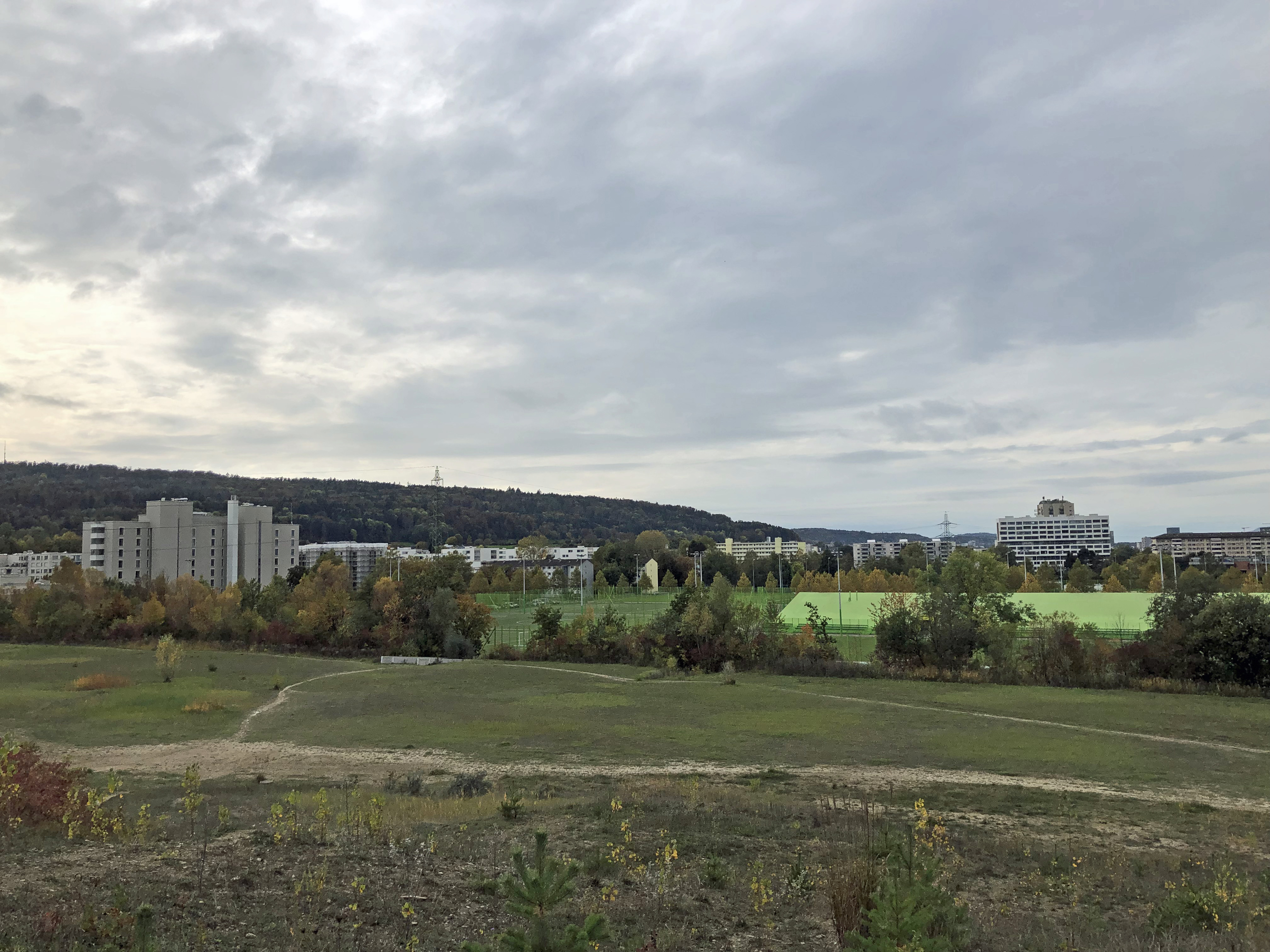 Sportanlage Heerenschürli und umgebende Häuser in Schwamendingen